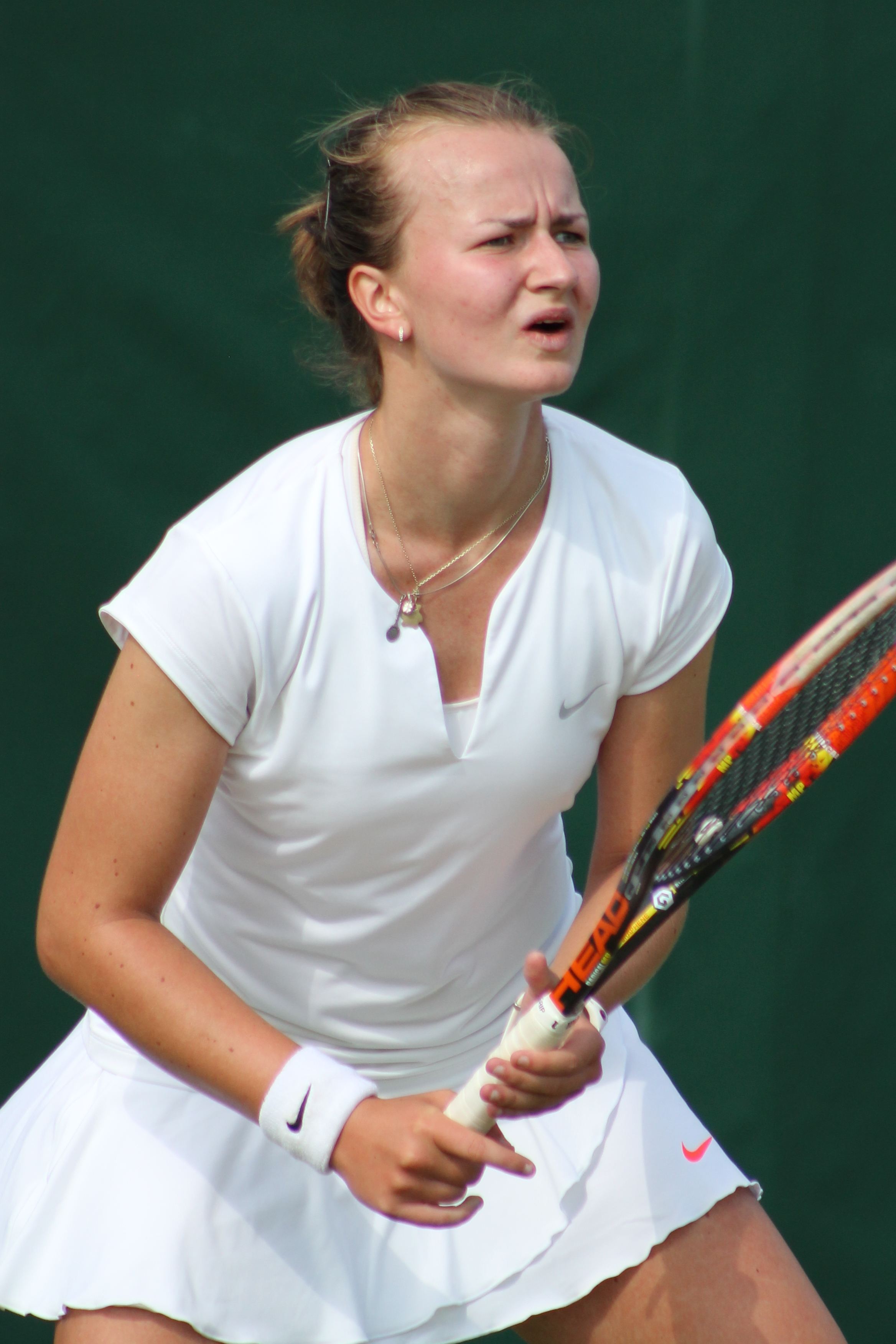 Krejcikova WMQ15 (7)